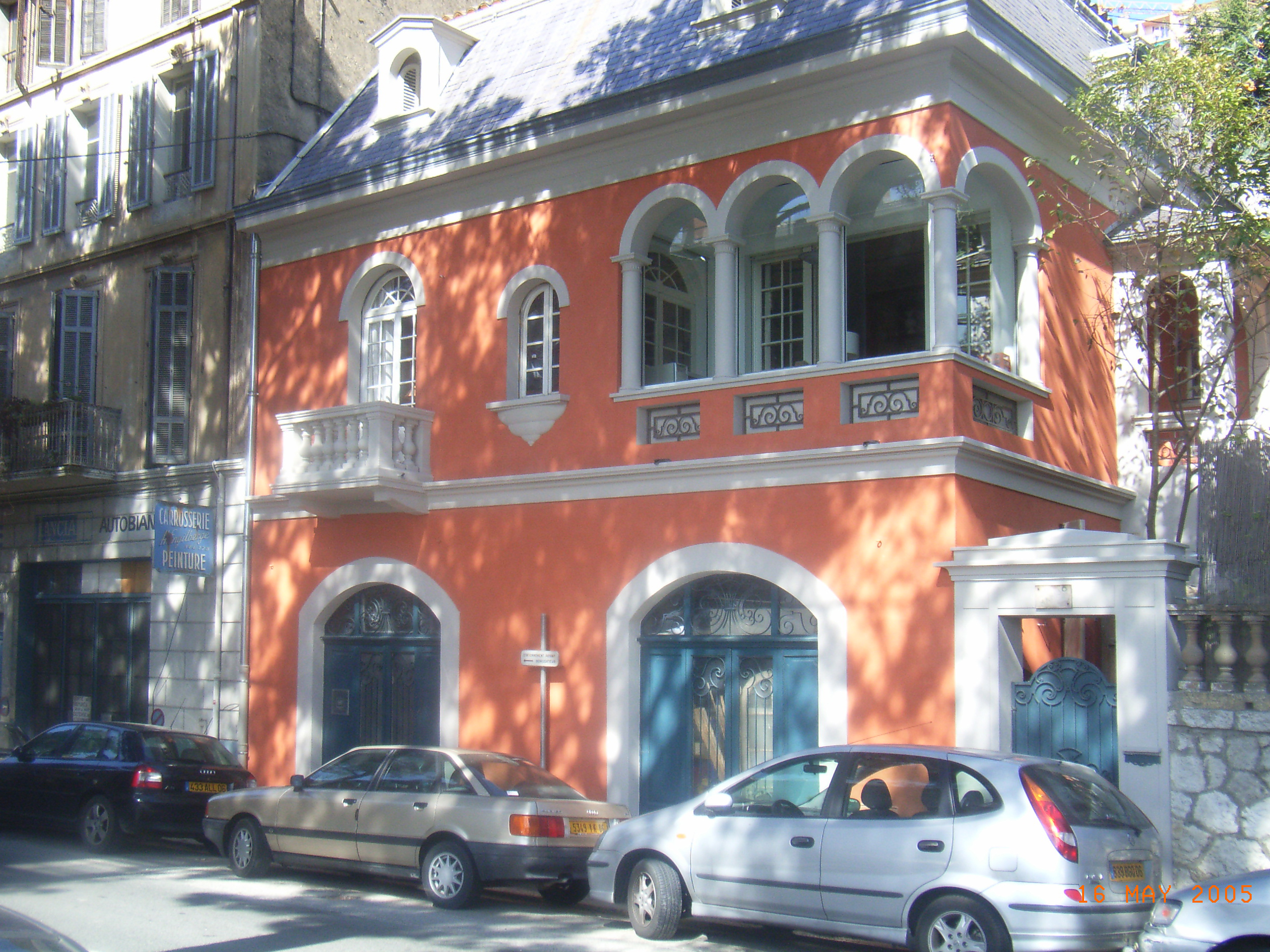 35 Avenue Thiers à Grasse (06).